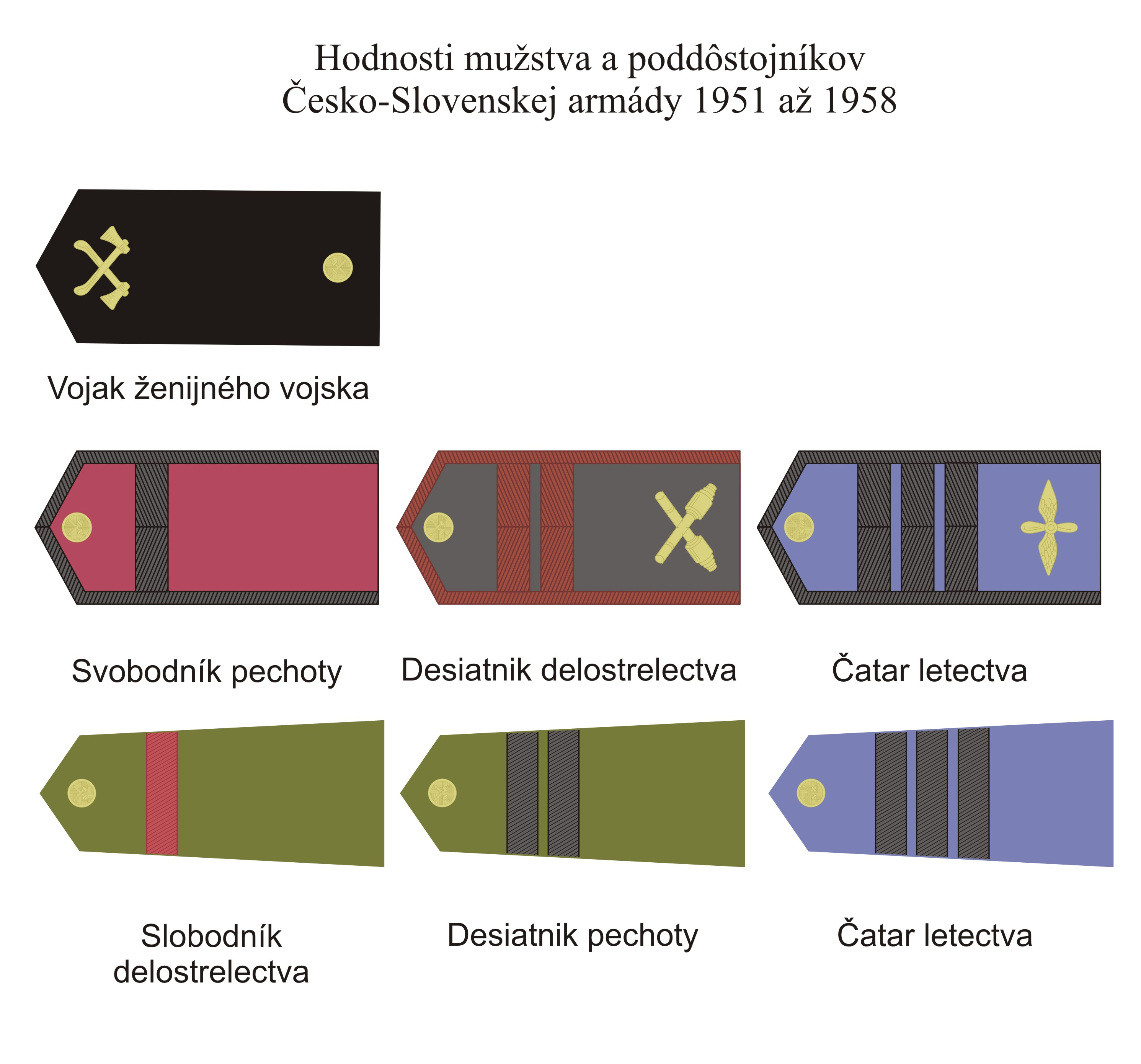 Vojenské hodnostné označenie mužstva a poddôstojníkov Česko-Slovenskej armády používané od roku 1951 do roku 1958